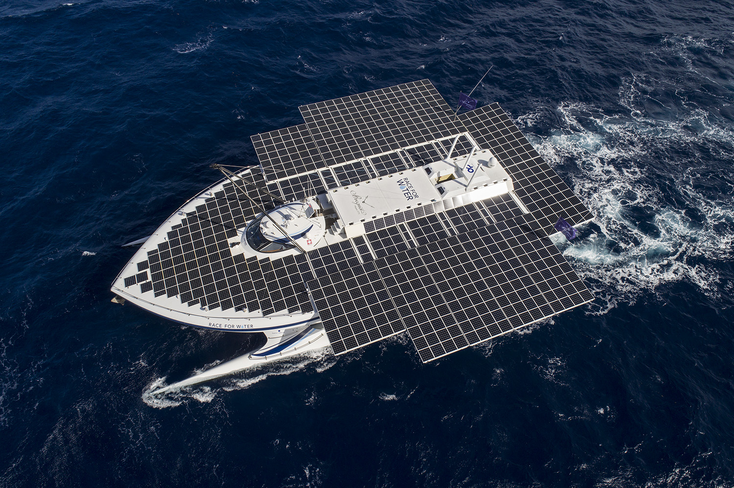 Navigation au large de la Guadeloupe janvier 2018